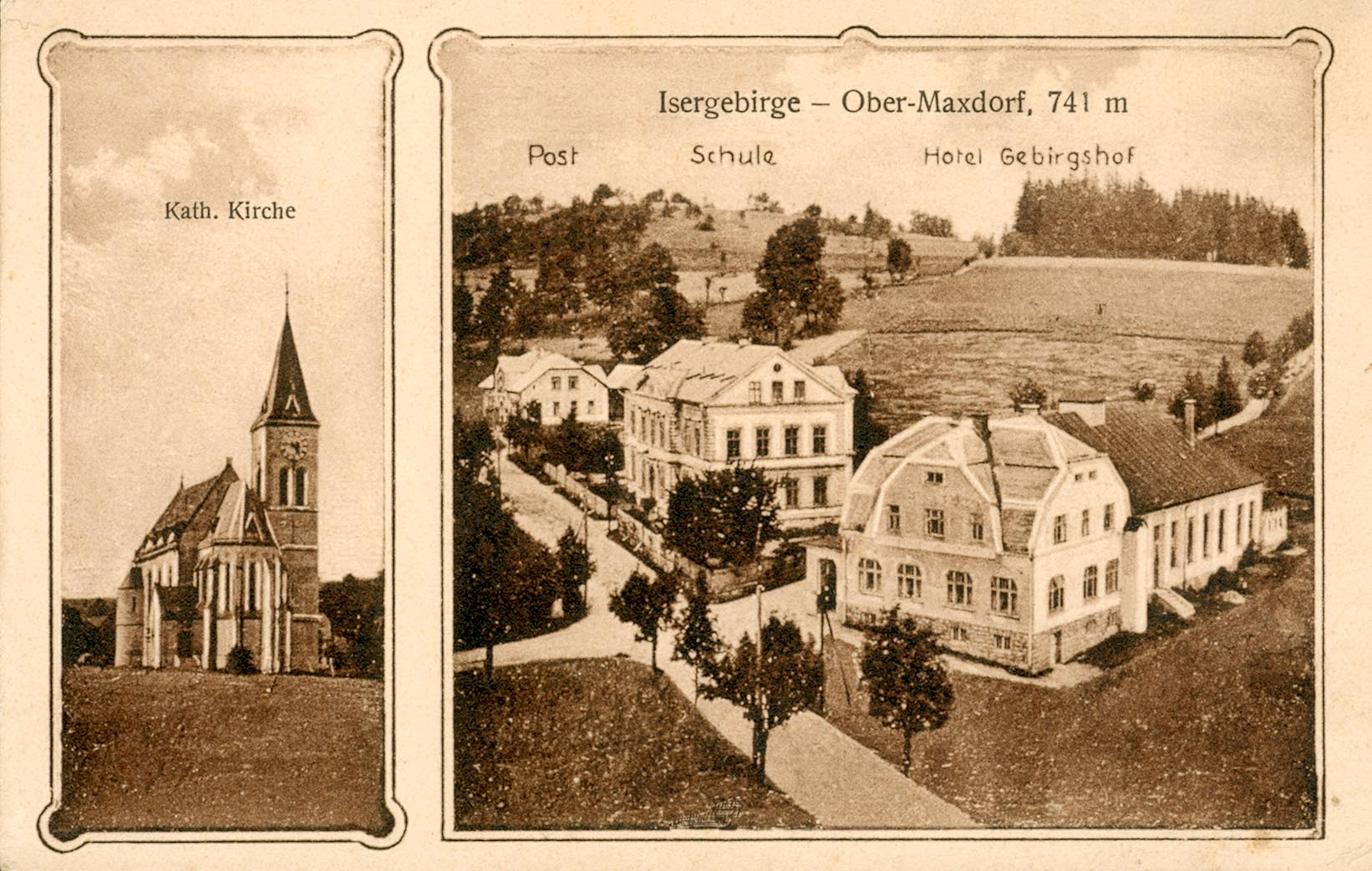 Prehled